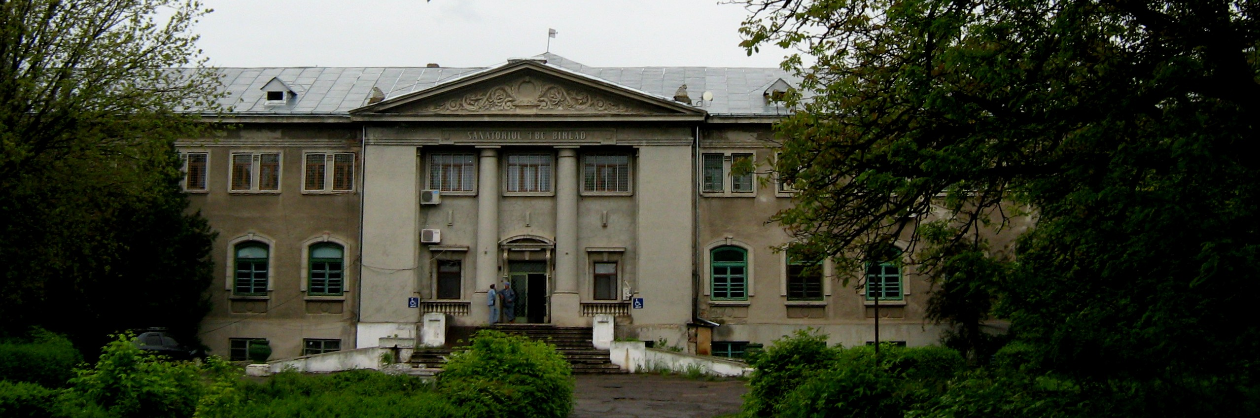 Spitalul Municipal de Urgență "Elena Beldiman" - Secția TBC